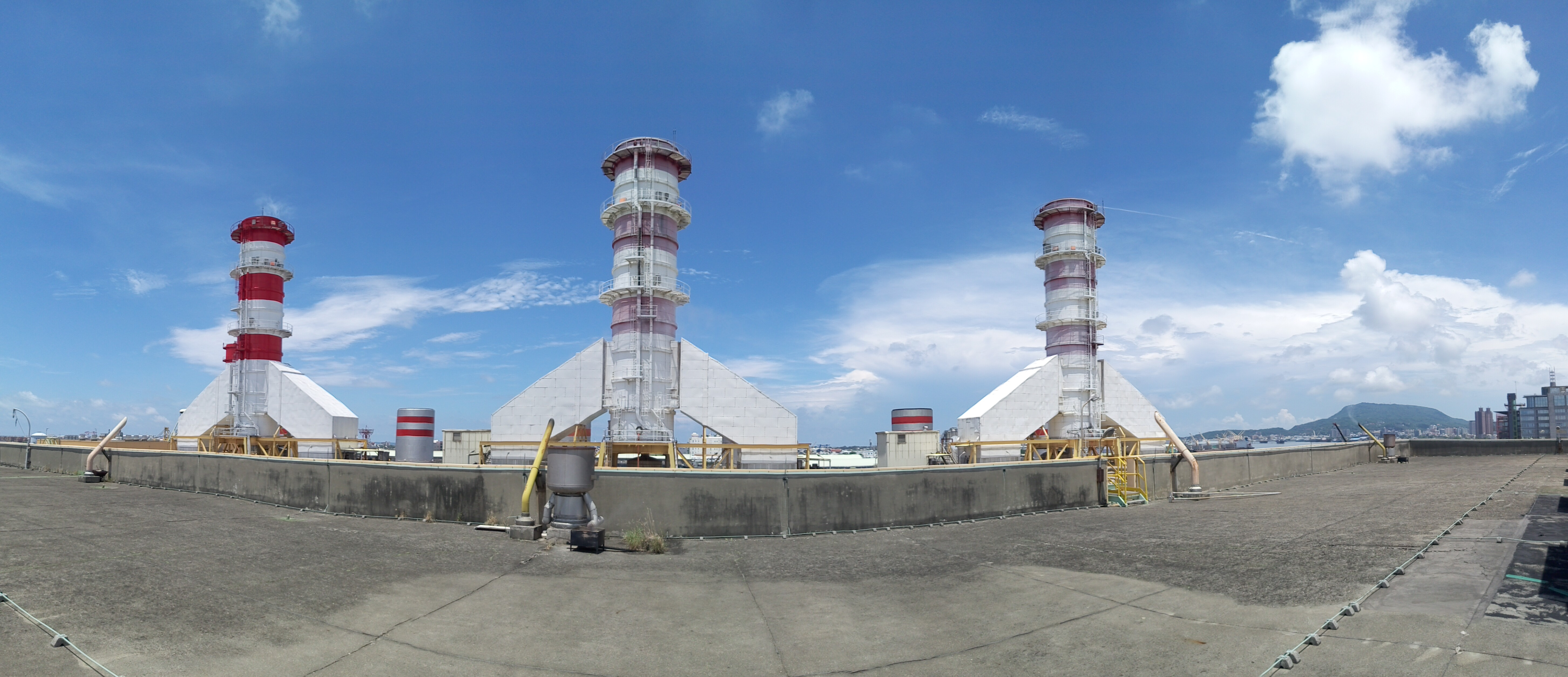 中文（台灣）: 台灣電力公司南部發電廠三部機組的主煙囪